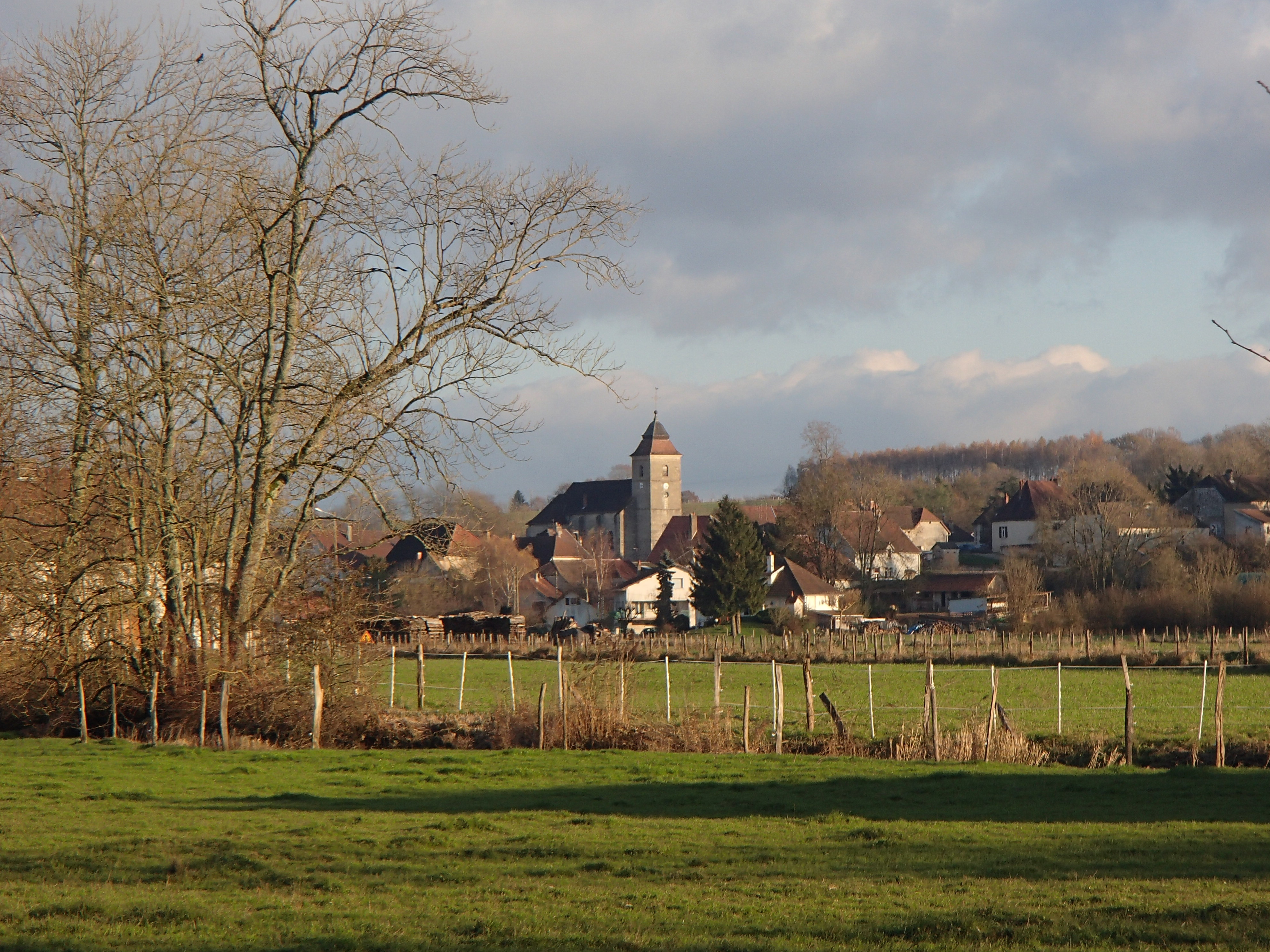 Vue clocher